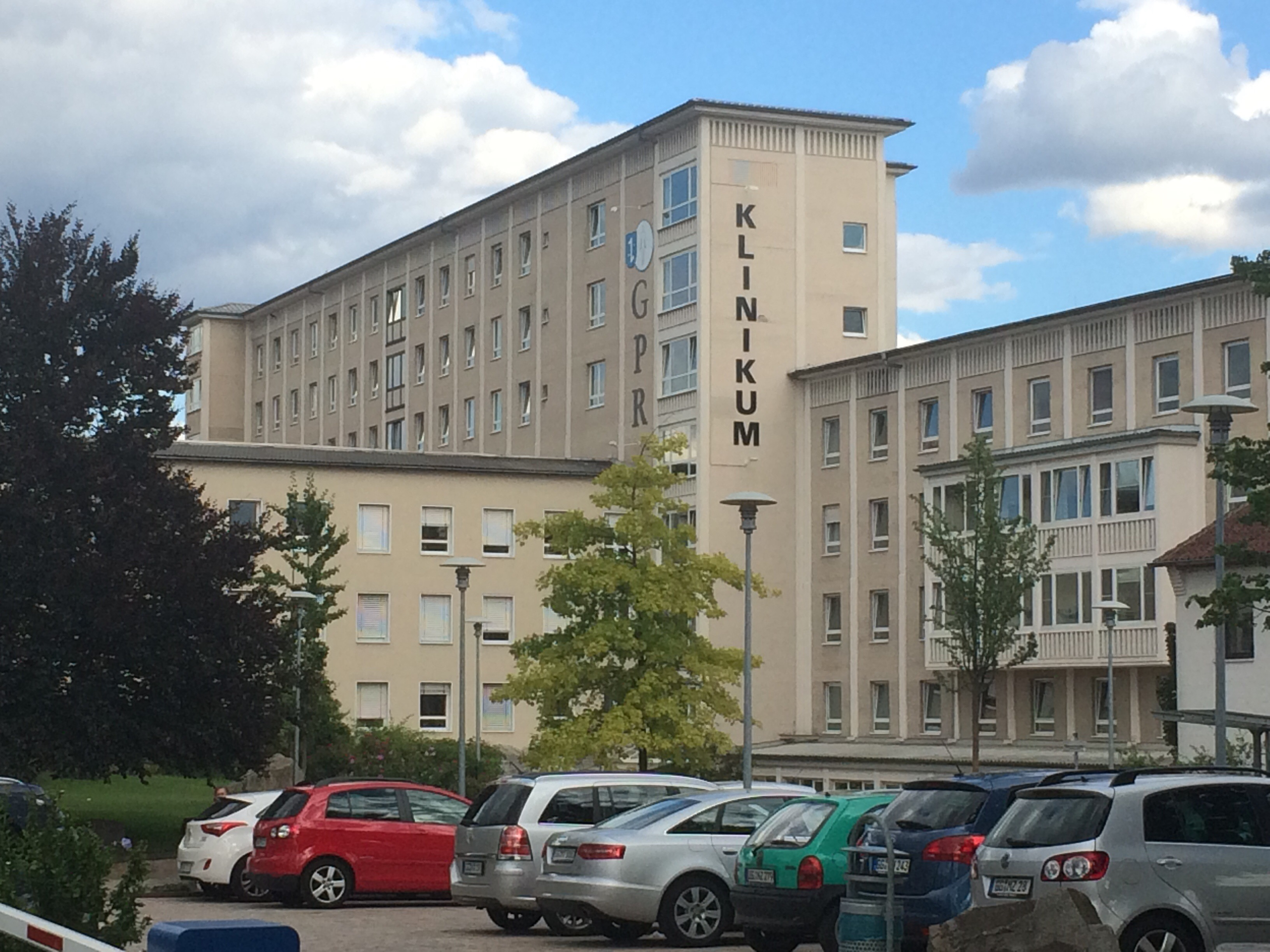 GPR Klinikum